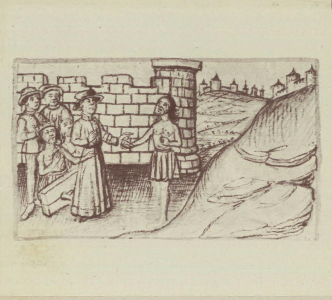 Ilustración idealizada titulada "Cómo Asche dice a Gadifer que él sería rey" incluida en el capítulo LXI de la versión de "Le Canarien" conocida como "texto B", que muestra al aborigen Afche aliándose con Gadifer de La Salle tras la captura del rey Guadarfía.